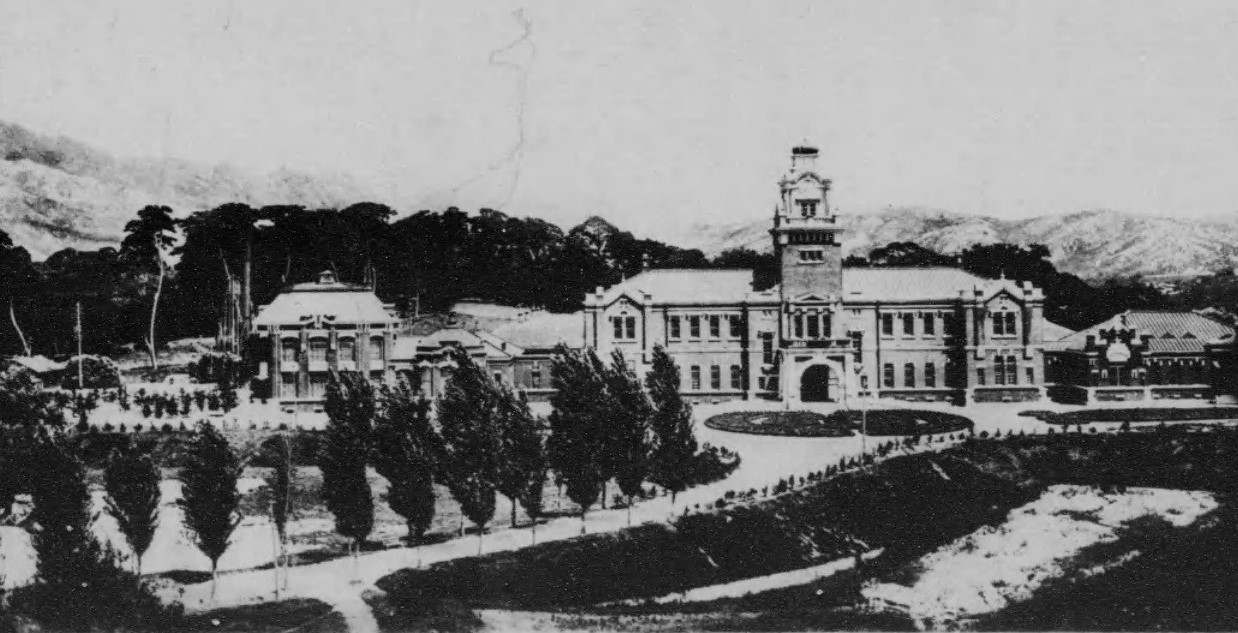 朝鮮総督府医院 朝鮮写真帖 (朝鮮総督府, 1921)